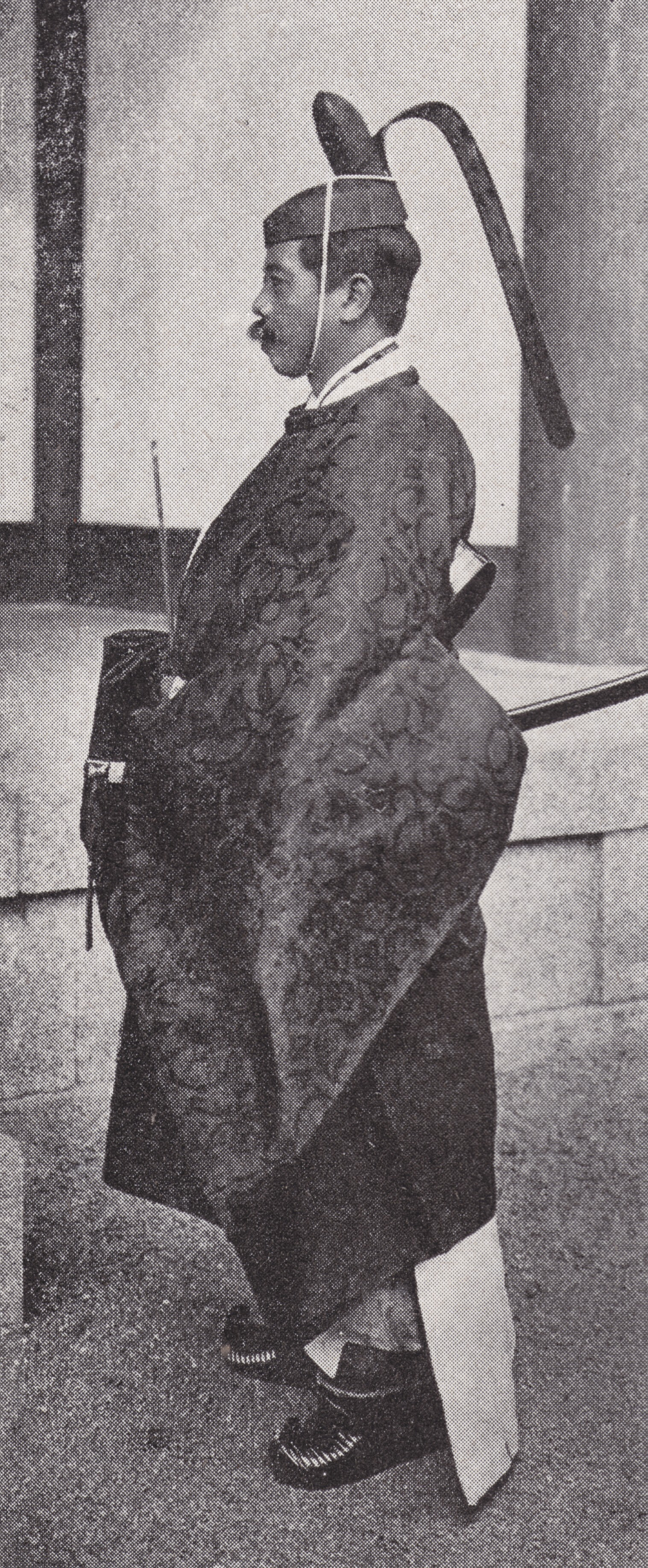 大礼使事務官・宮内事務官・三室戸敬光